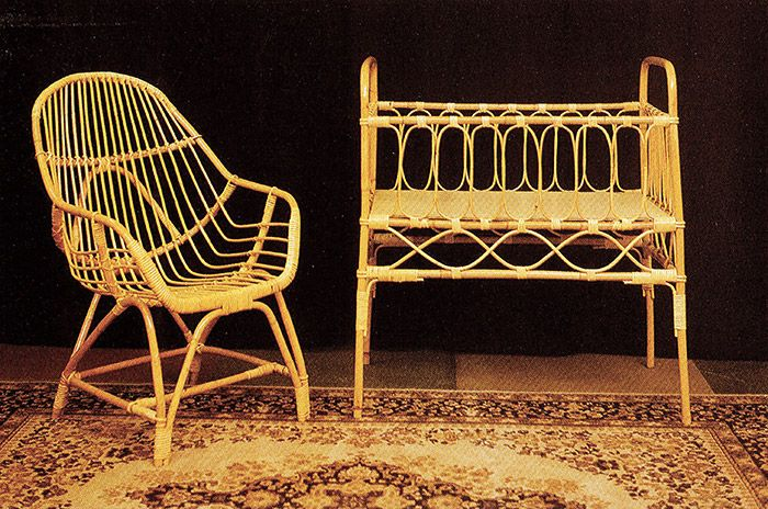 Parolan rottingin klassikot: kukkapöytä ja lumikenkätuoli